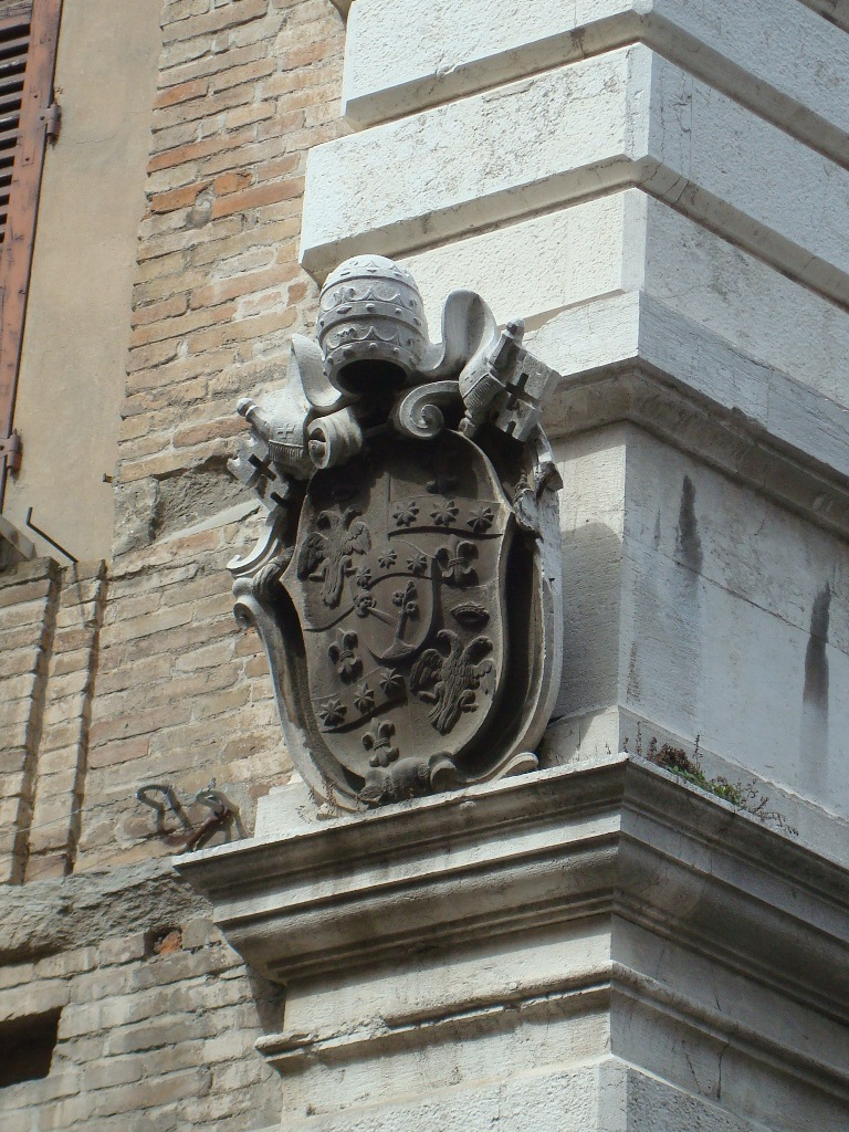 Cesena (Italie), façade côté rue du Palazzo Ghini, détail de l'emblème sur le pilier est.